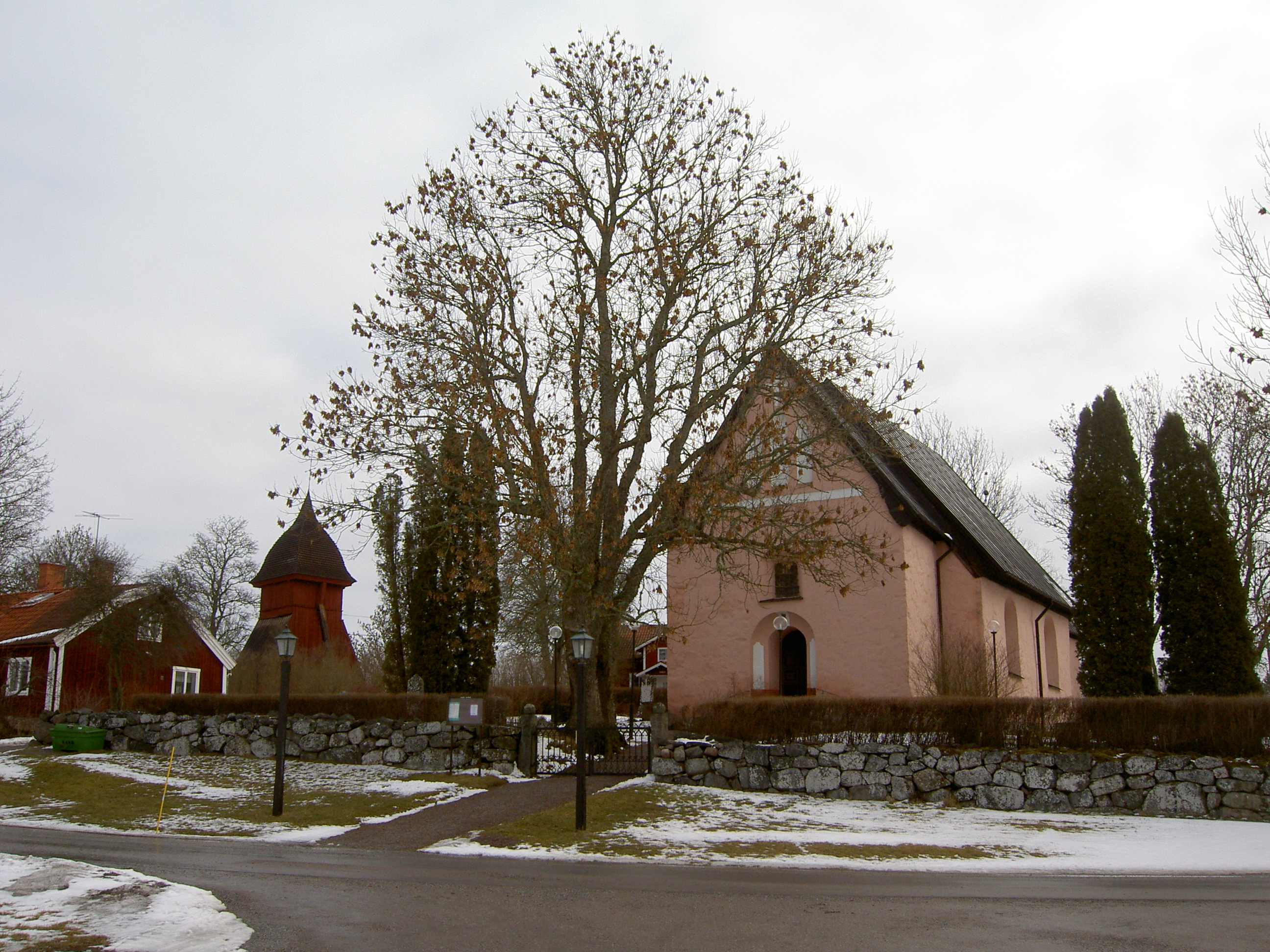 Haga kyrka från parkeringsplatsen. Kyrkobyggnad och klockstapel är synliga.